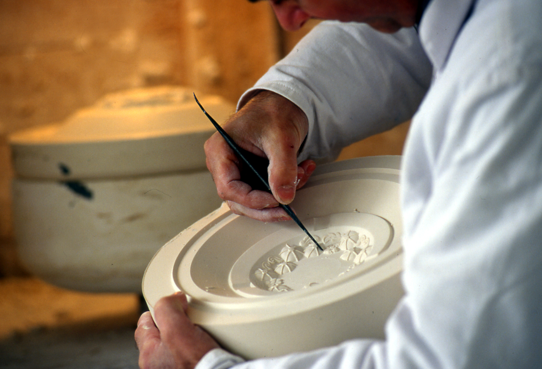 Réalisation de Porcelaine